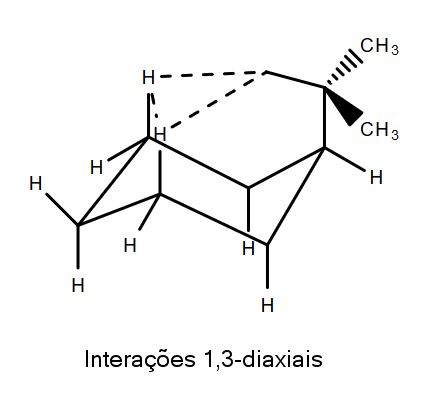 Representação de interações 1,3-diaxiais em um ciclo-hexano substituído com um grupo t-butil em posição axial.